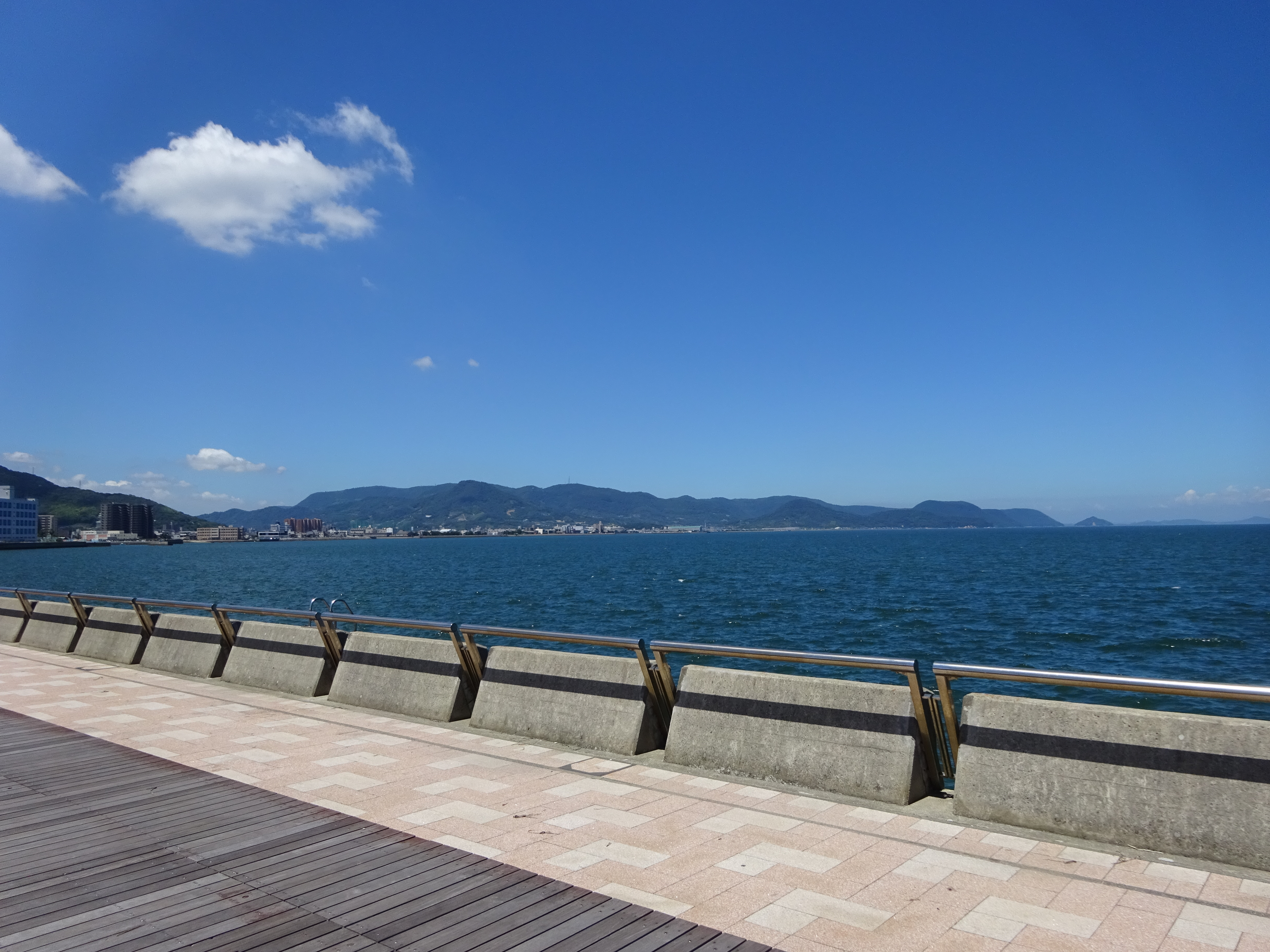 サンポートの赤灯台の遊歩道で五色台を遠望。七月下旬